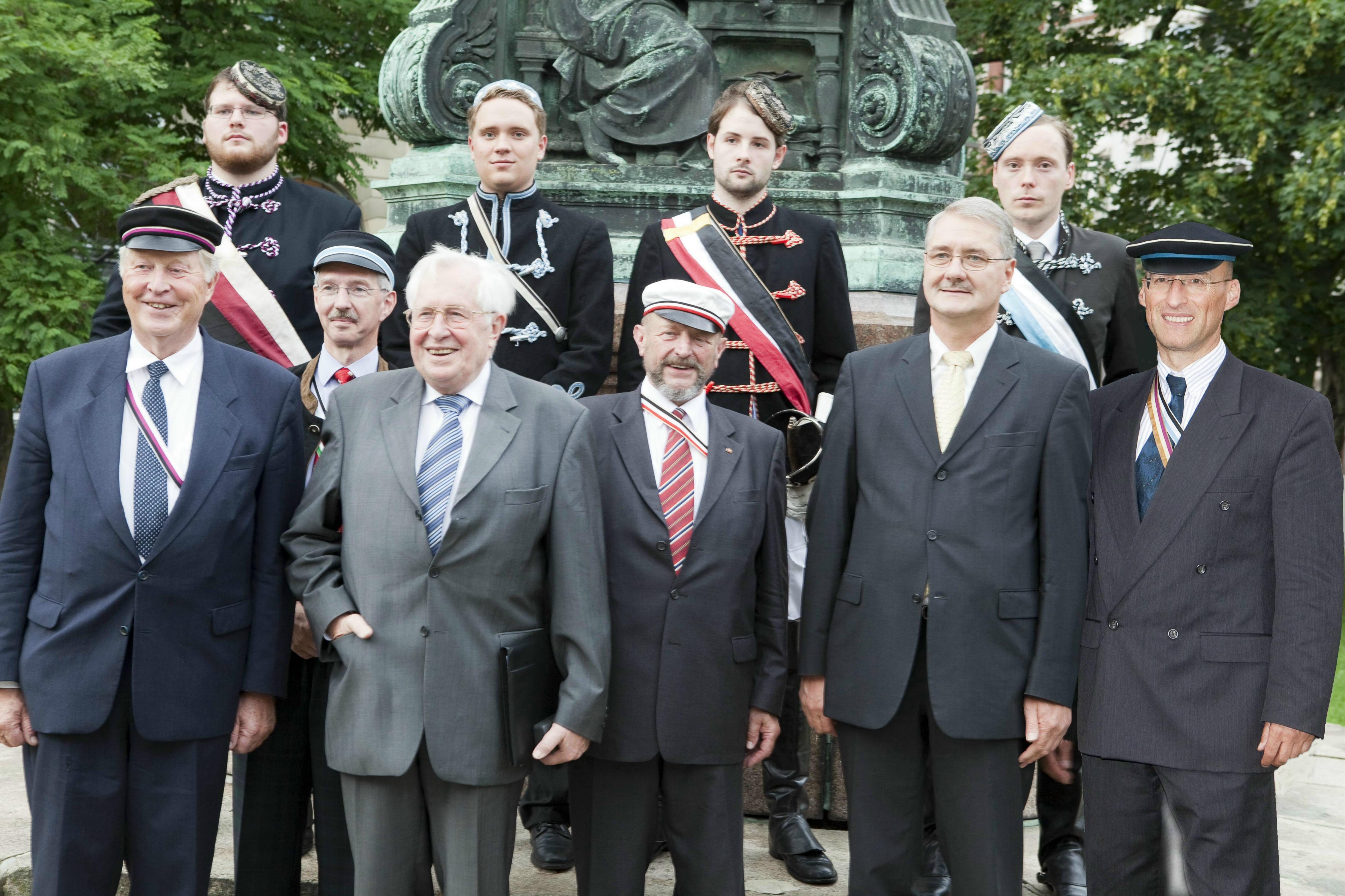 100 Jahre Eisenacher Kartell: Die Senioren und Altherrenschafts-Vorsitzenden der vier Corps mit Ministerpräsident Bernhard Vogel und Oberbürgermeister Matthias Doht vor dem Lutherdenkmal in Eisenach. This is a retouched picture, which means that it has been digitally altered from its original version. Modifications: Joachim Rieß in the right has been added to the picture digitally.